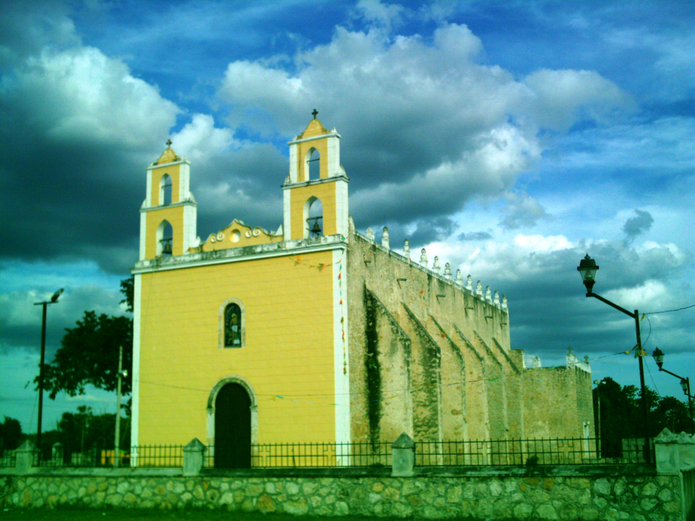 Iglesia de Nolo, Yucatán.